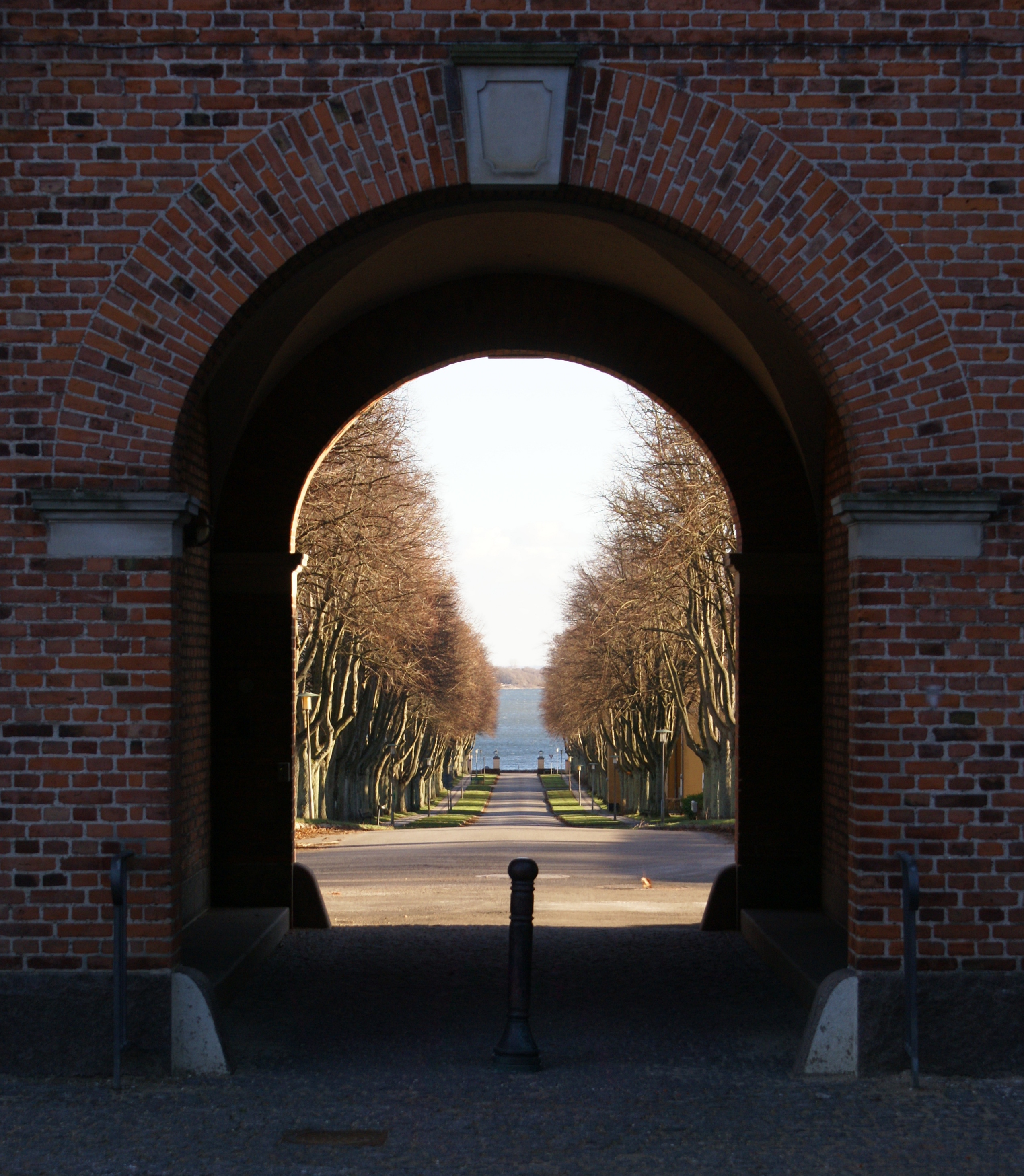 Alléen set gennem porten i hovedbygningen.